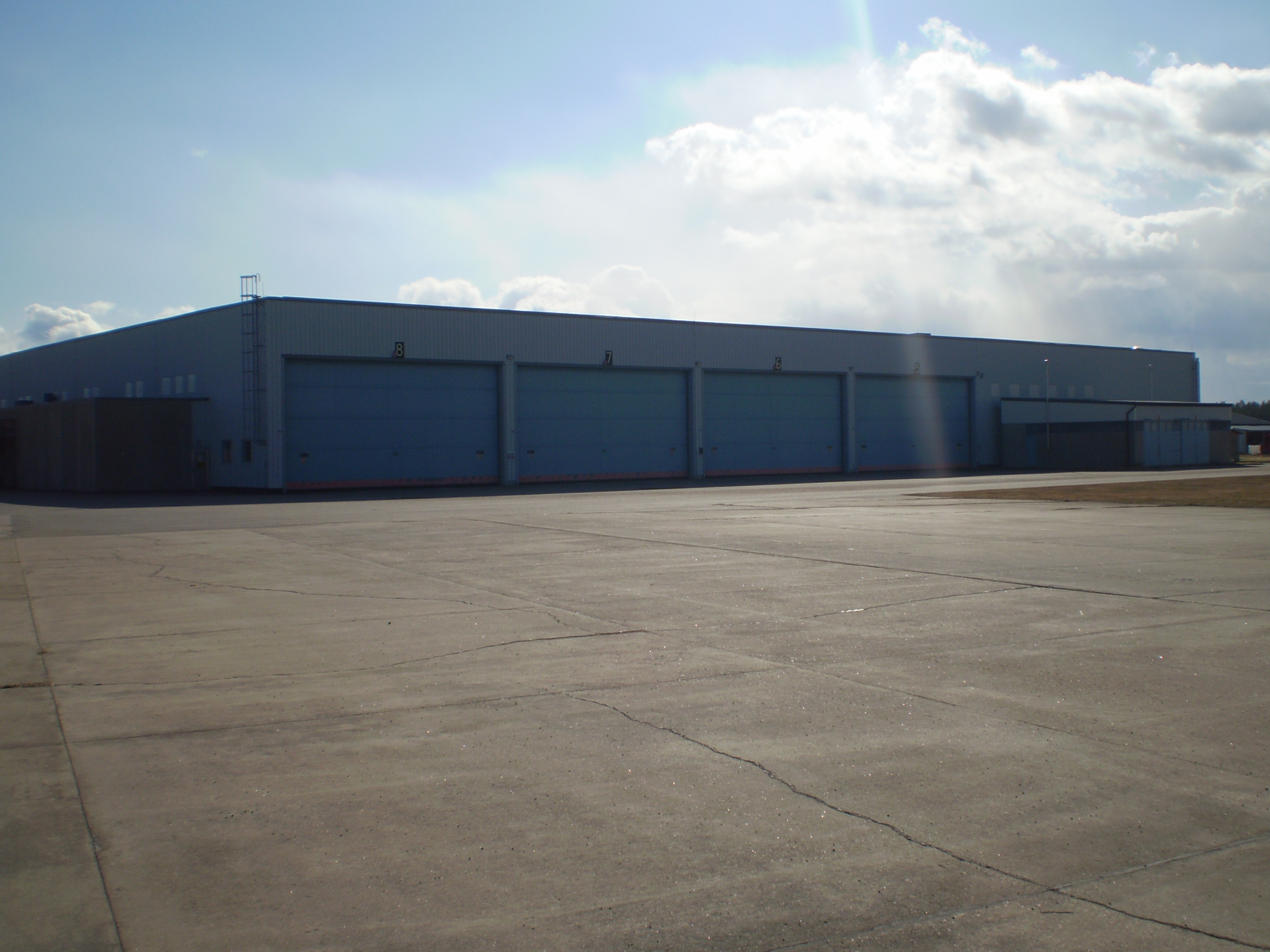 Hangar vid F15 Söderhamn